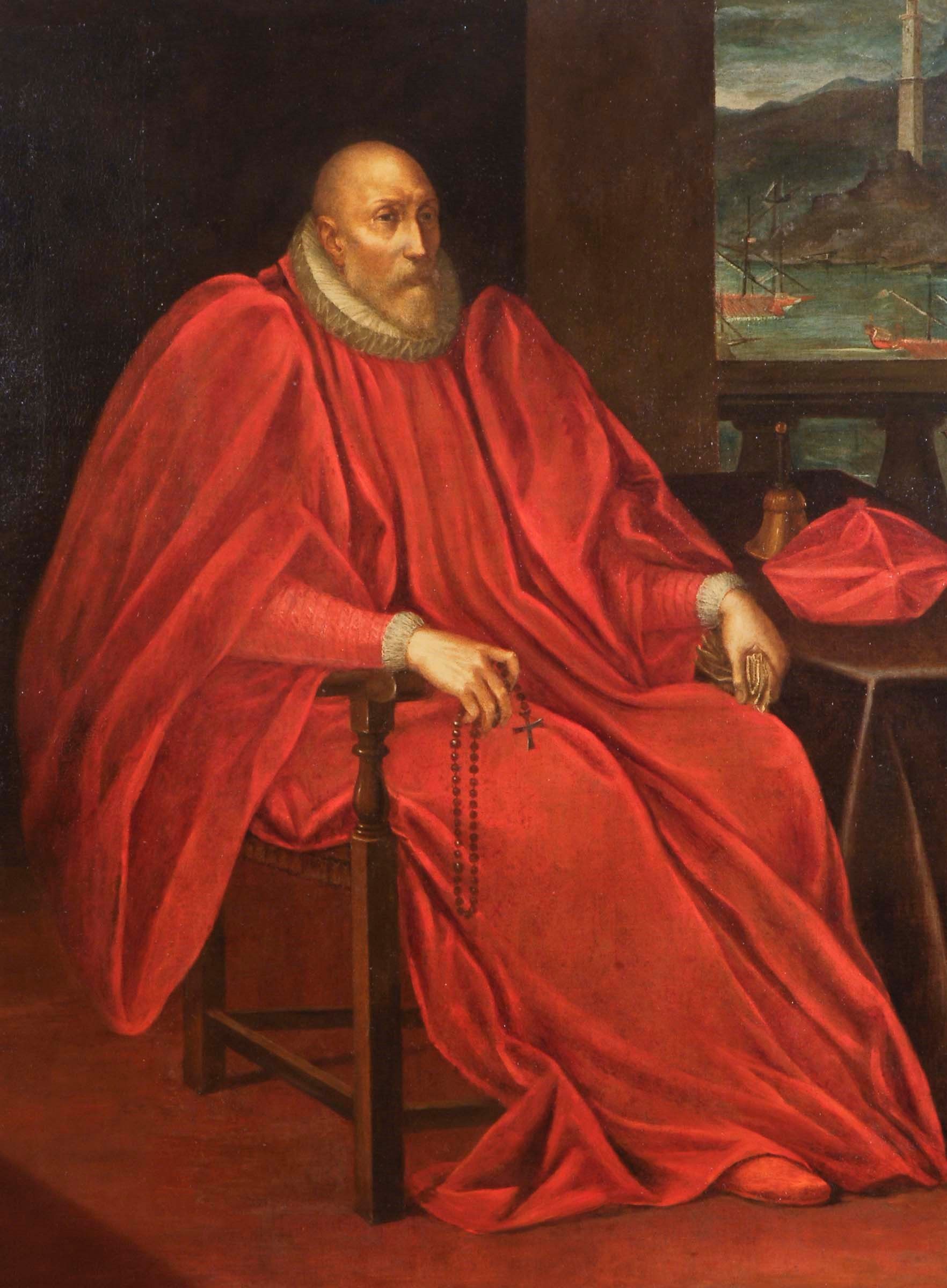 Dipinto olio su tela del pittore Andrea Semino raffigurante il doge Simone Spinola (1567-1569)